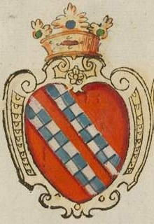 Wappen der Hauteville - Großes Wappenbuch, enthaltend die Wappen der deutschen Kaiser, der europäischen Königs- und Fürstenhäuser, der Päpste und Kardinäle, Bischöfe und Äbte bis zu den lebenden Repräsentanten zur Zeit der Regentschaft Kaiser Rudolfs II. und Papst Gregors XIII. - Cod.icon. 333